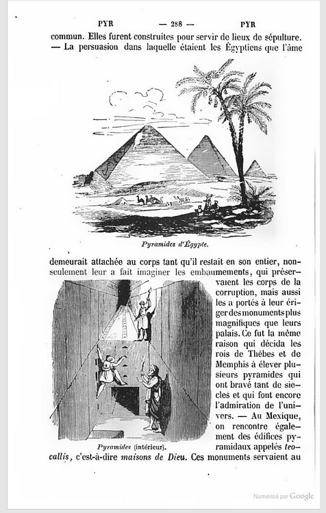 Page du Dictionnaire de conversation à l'usage des dames et des jeunes personnes, ou Complément nécessaire de toute bonne éducation, Volume 9. Google Books